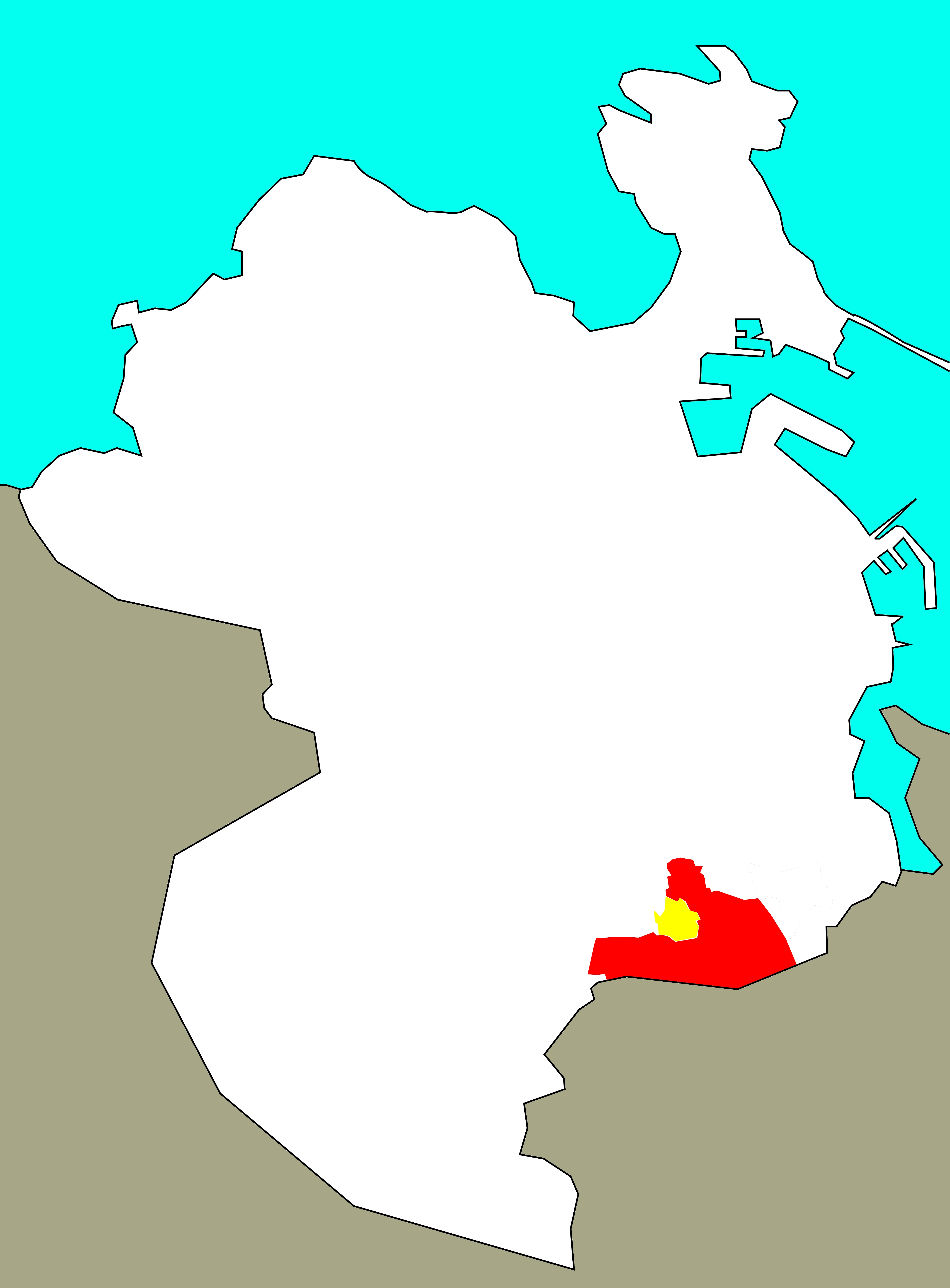 Situación da Zapateira (vermello) no concello da Coruña, segundo En amarelo, O Escorial